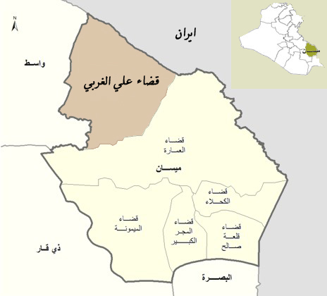 الخارطة الادارية لقضاء علي الغربي